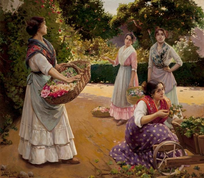 La obra representa a un grupo de mujeres floristas en el Parque de María Luisa de la ciudad de Sevilla.